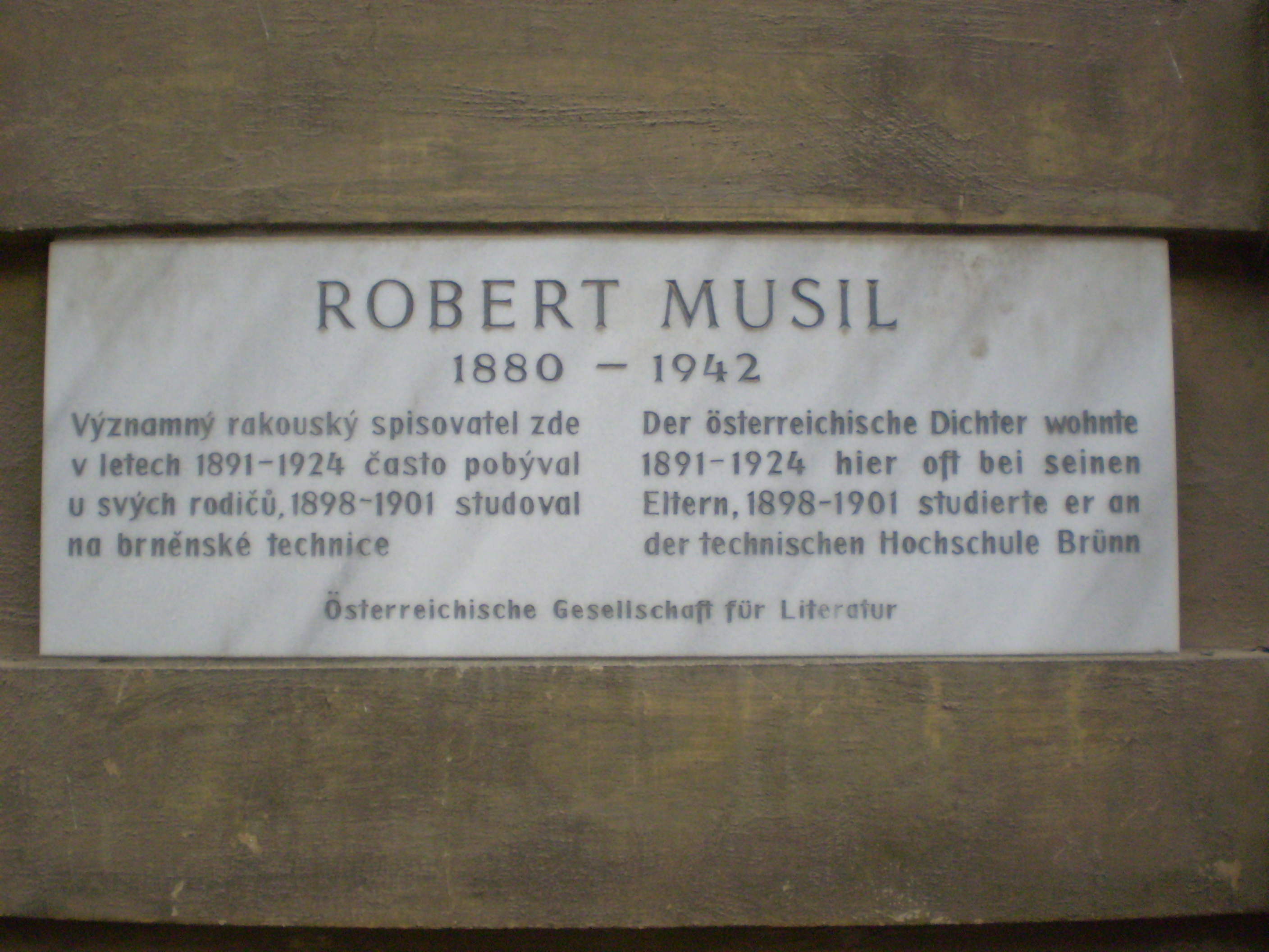 Pamětní deska na Roberta Musila v Brně v Jaselské ulici